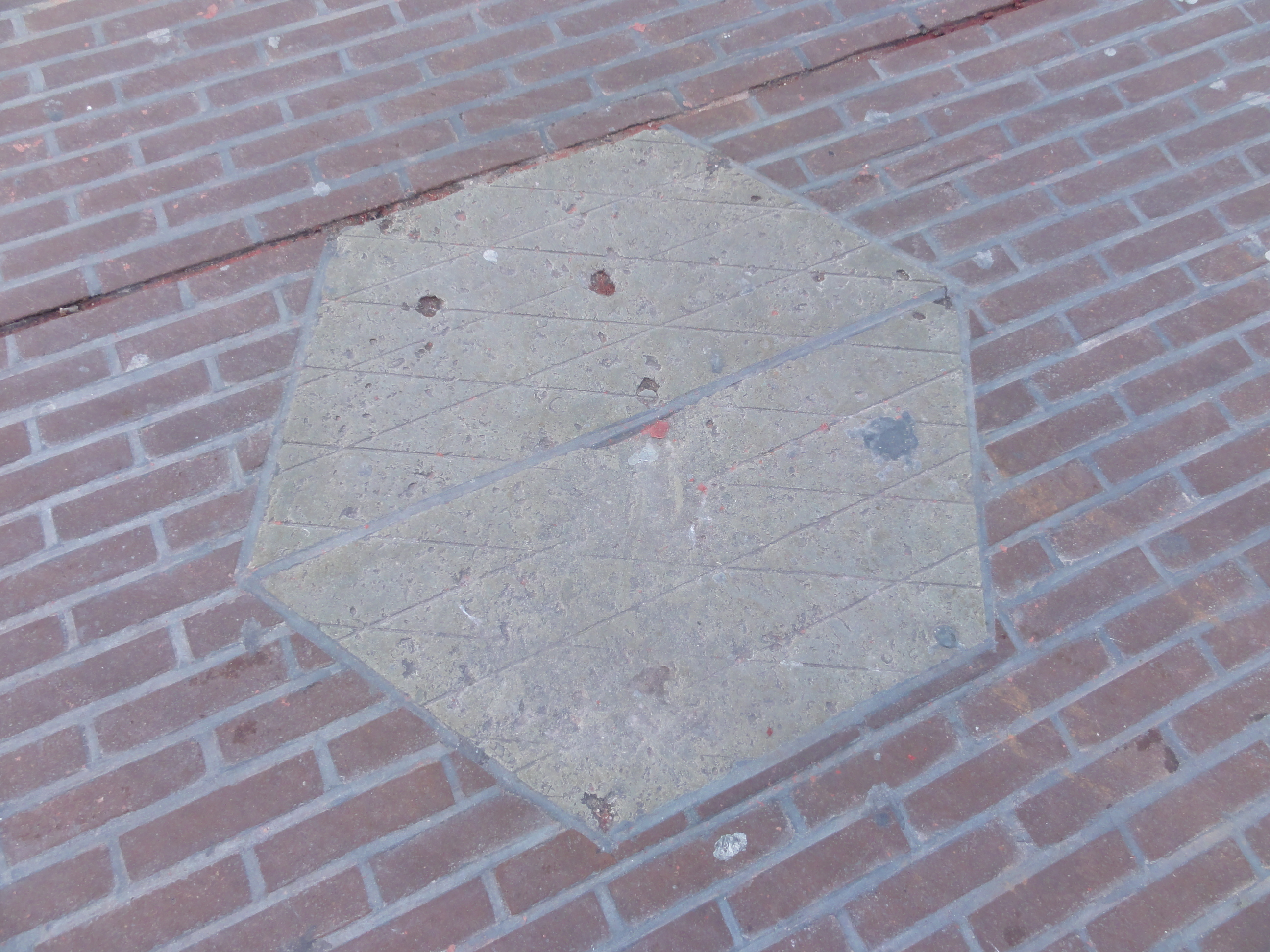 De Witte Steen in Leiden ligt op de Visbrug, op de grens tussen de parochies van Sint Pancras (Hooglandse Kerk) en Sint Pieter (Pieterskerk). De steen markeerde bovendien het rechtsgebied van de burggraaf in de Burcht.